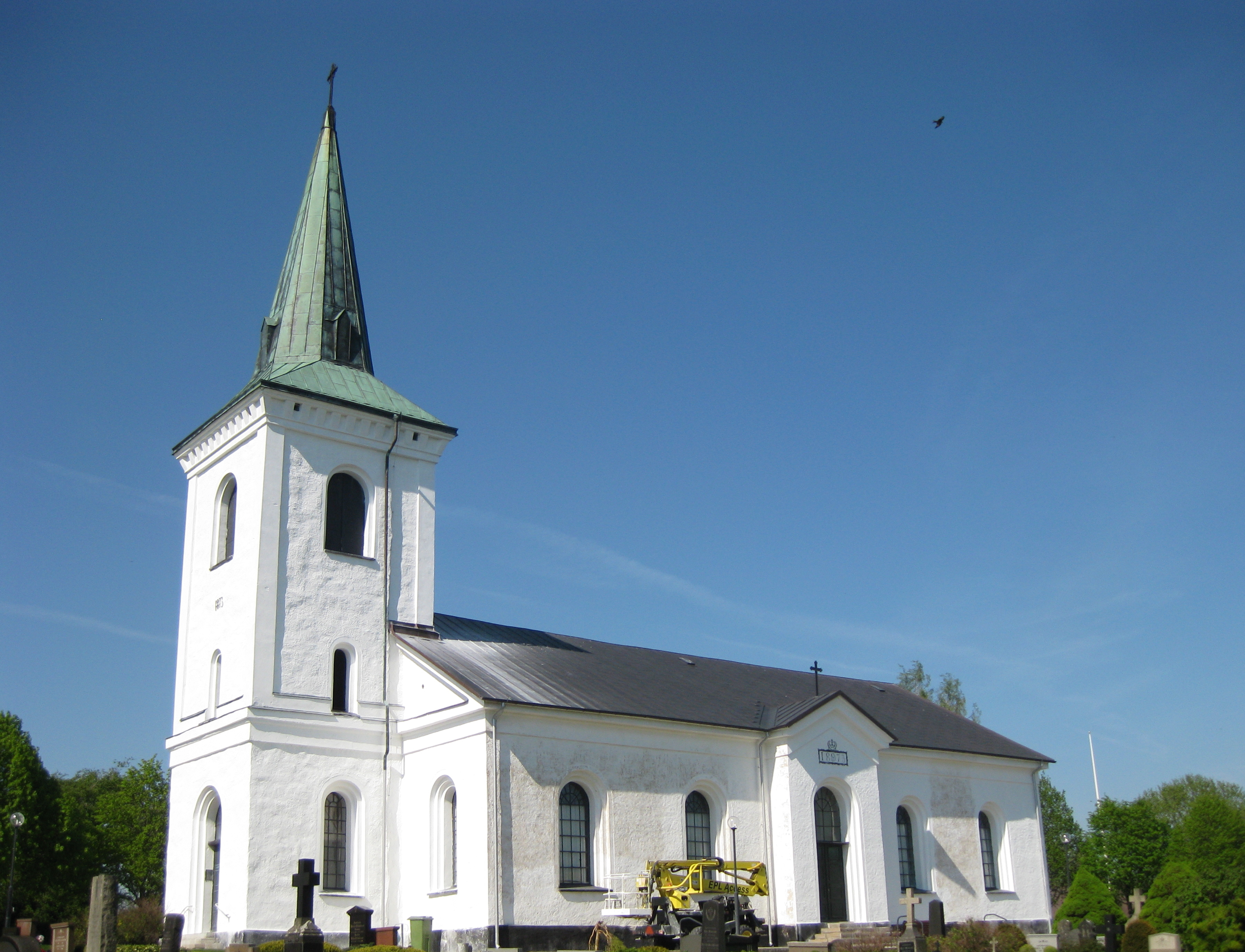 Kverrestads kyrka i maj 2012